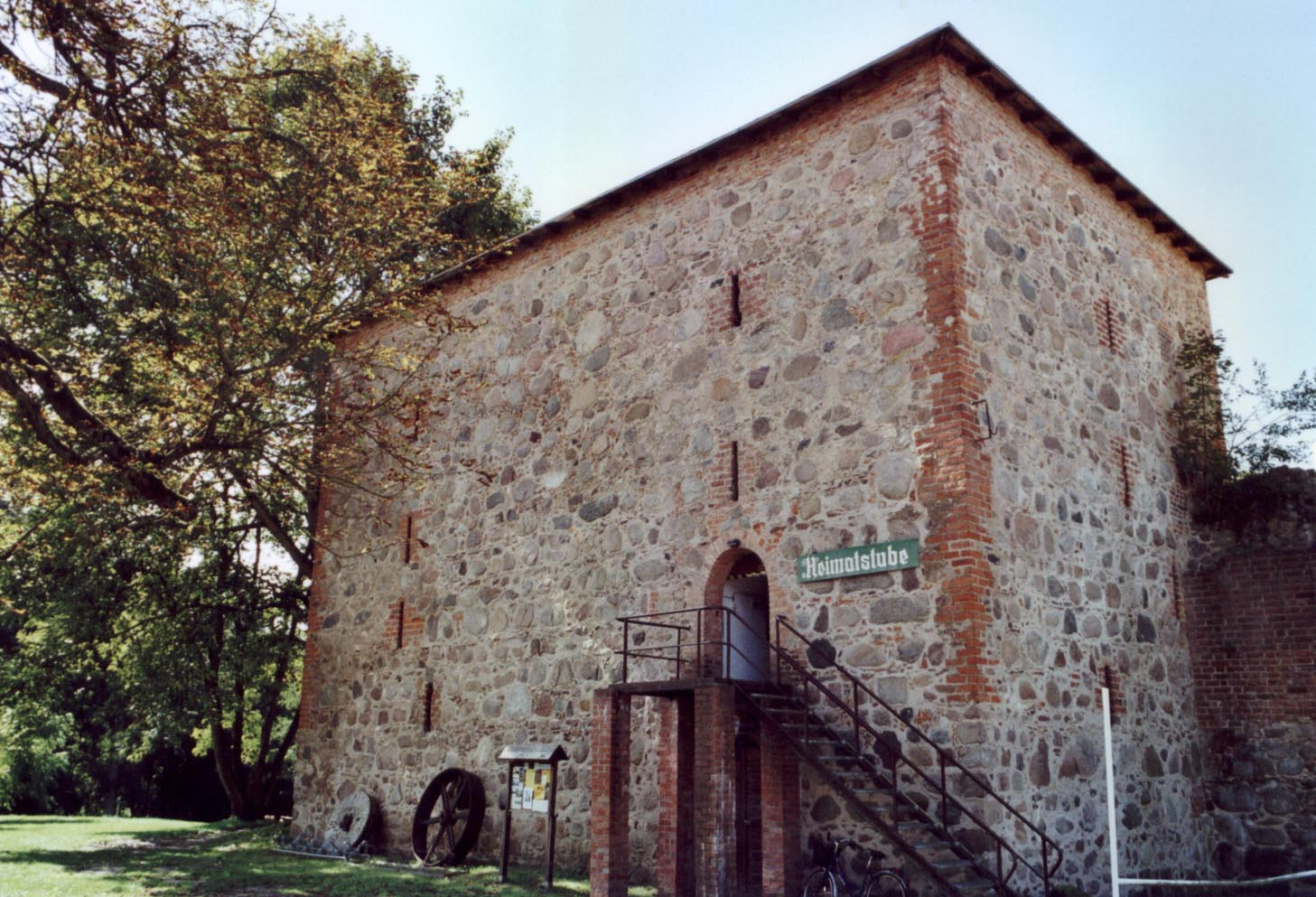 Burg Gerswalde, sog. neue Kemenate, selbst fotografiert, MacElch (Rainer Kunze), 2006